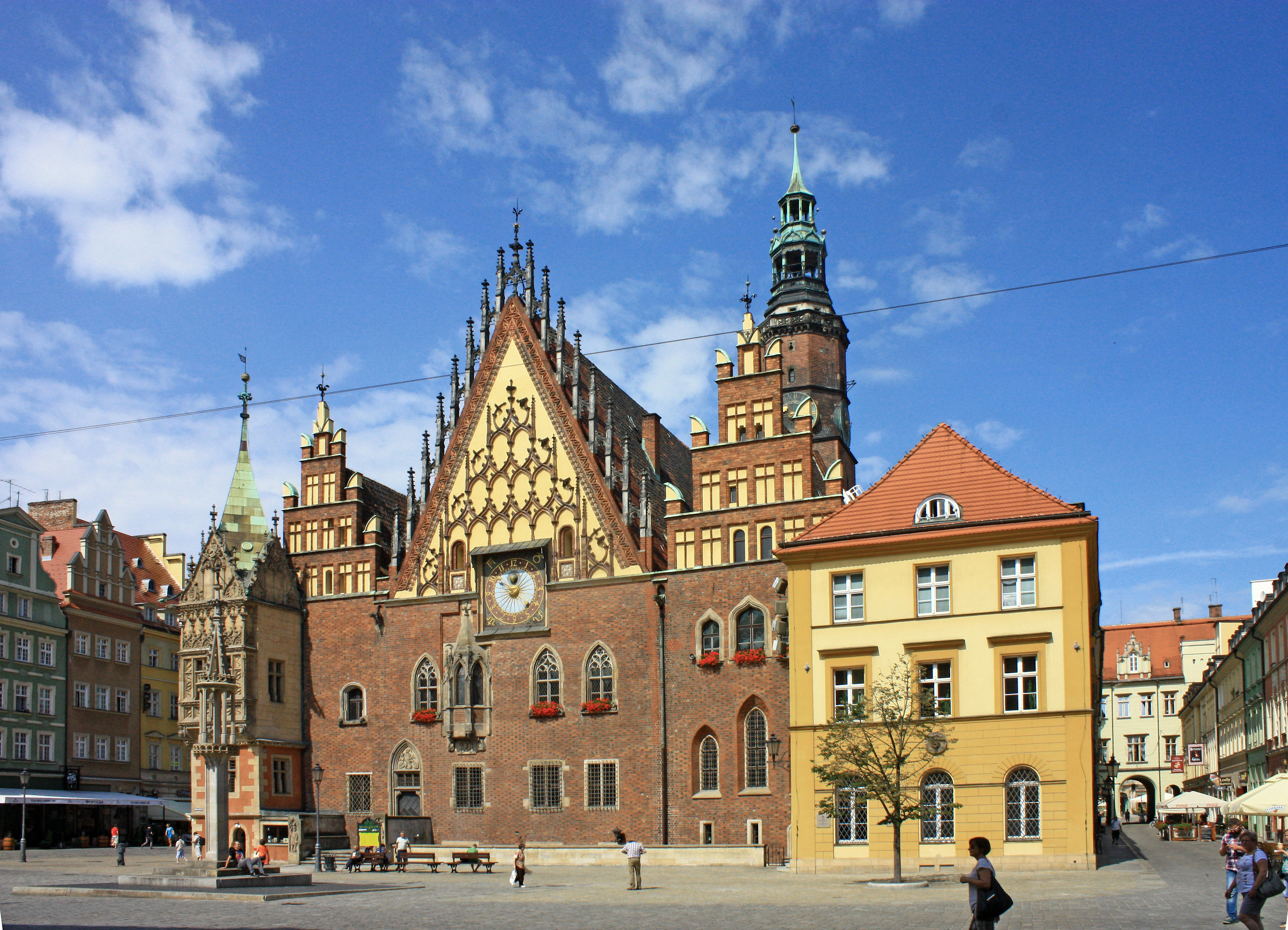 Wrocław, Ratusz Staromiejski